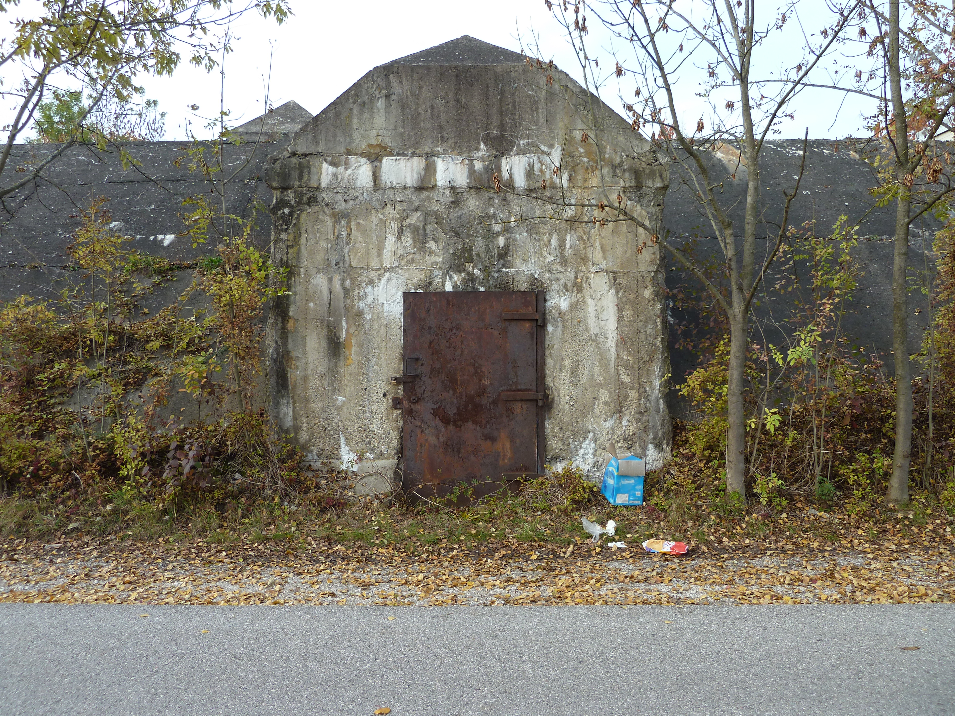 Luftschutzbunker